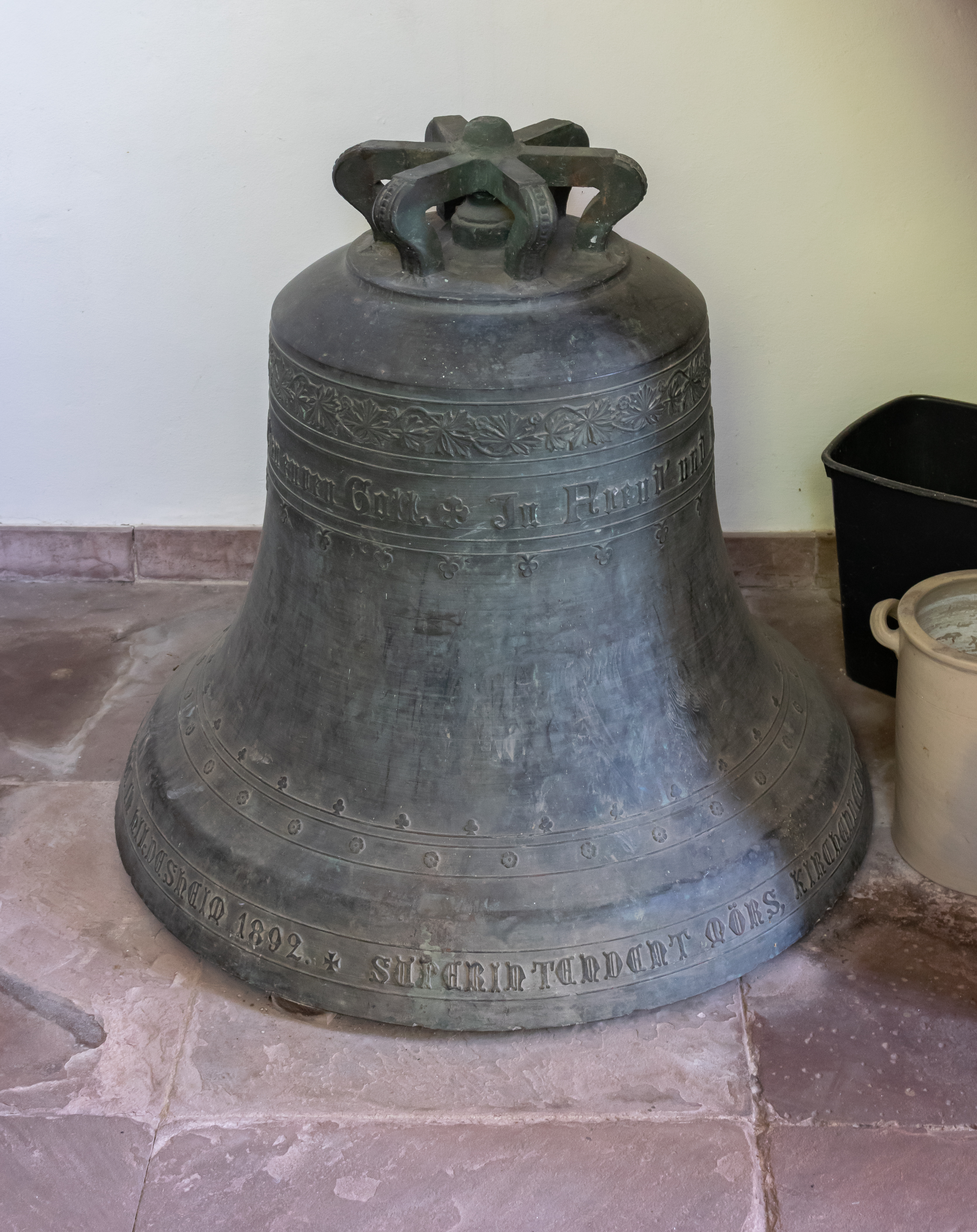 ausgebaute Bronzeglocke der evangelisch-reformierten Kirche in Dörentrup-Bega